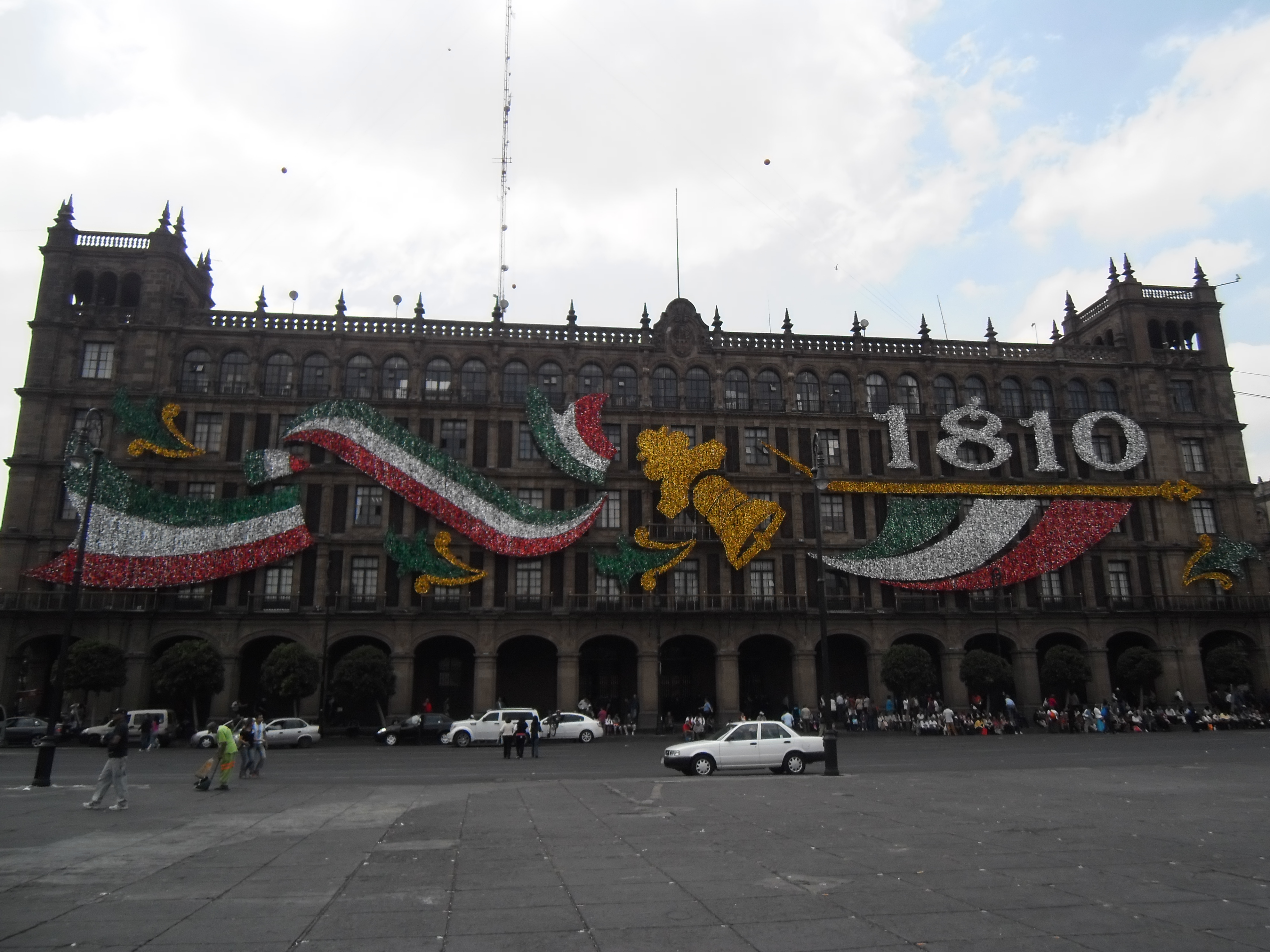 Oficinas del Gobierno del Distrito Federal